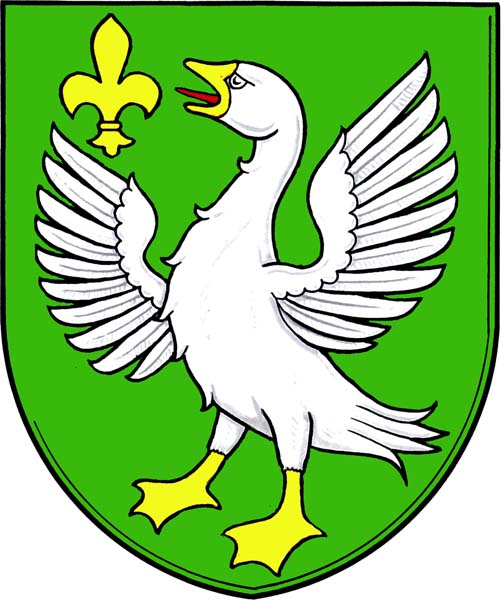 znak obce Loučany